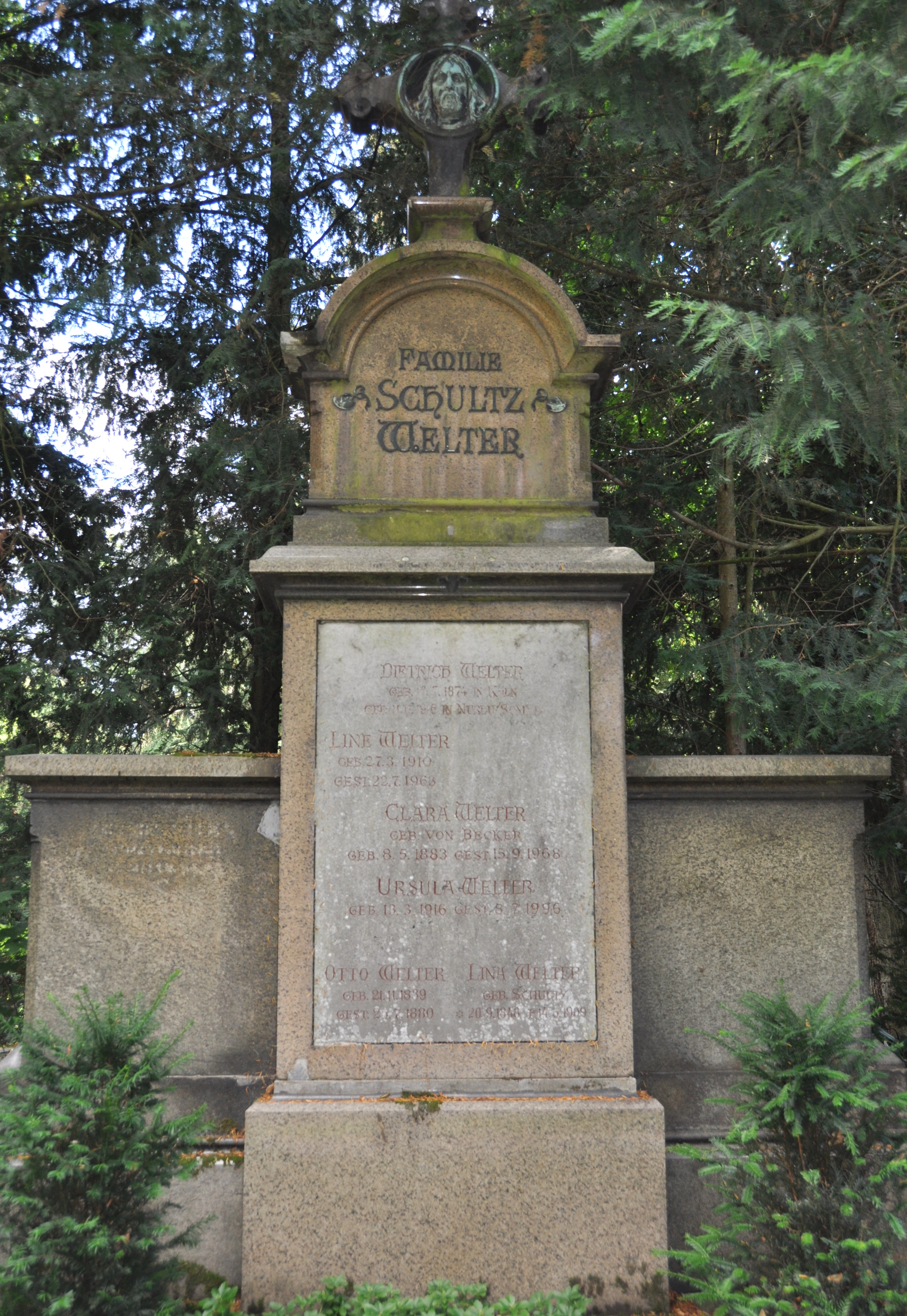 Grabstätte der Familie Schultz und Welter auf dem Melaten-Friedhof in Köln